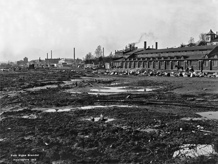 1912 . Sörnäisten rantatie 27 - 25, 23, 21, 19, 17, 15. Sörnäisten rantatie 25-27:ssä Oy Silfverbergin Wecksellin yhdistetyt Hattutehtaat